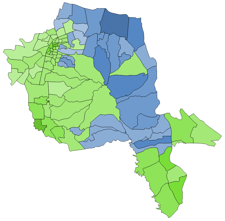 顏色對照表